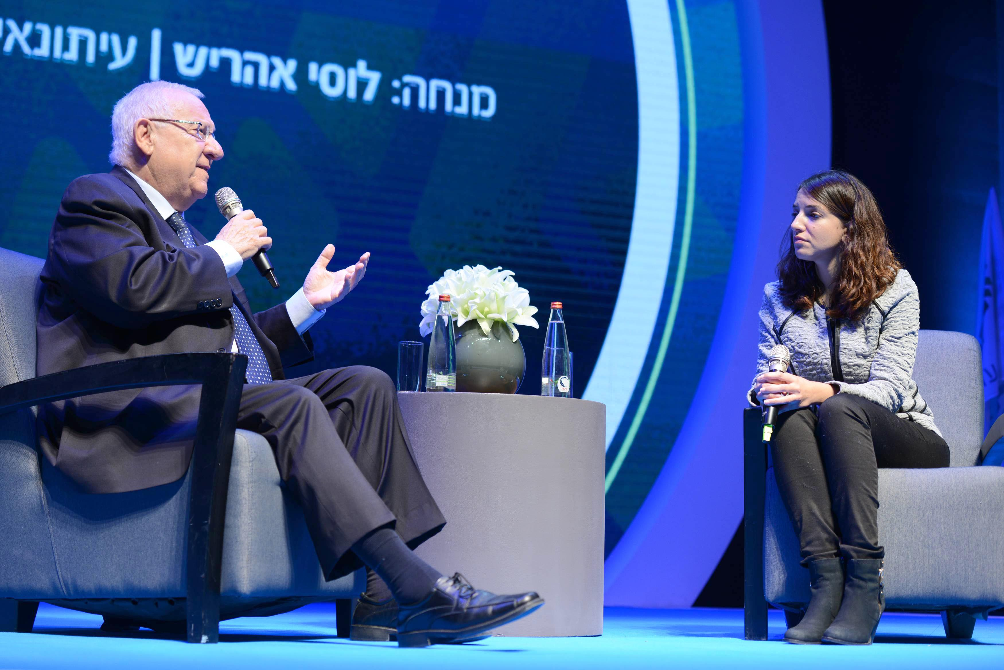 נשיא מדינת ישראל ראובן ריבלין בכנס ברל כצנלסון לסובלנות ולמאבק בגזענות ומרואיין על ידי לוסי אהריש